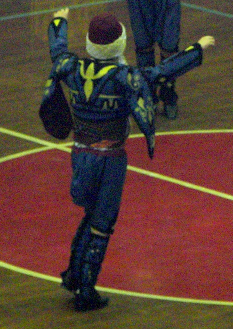 Lisans